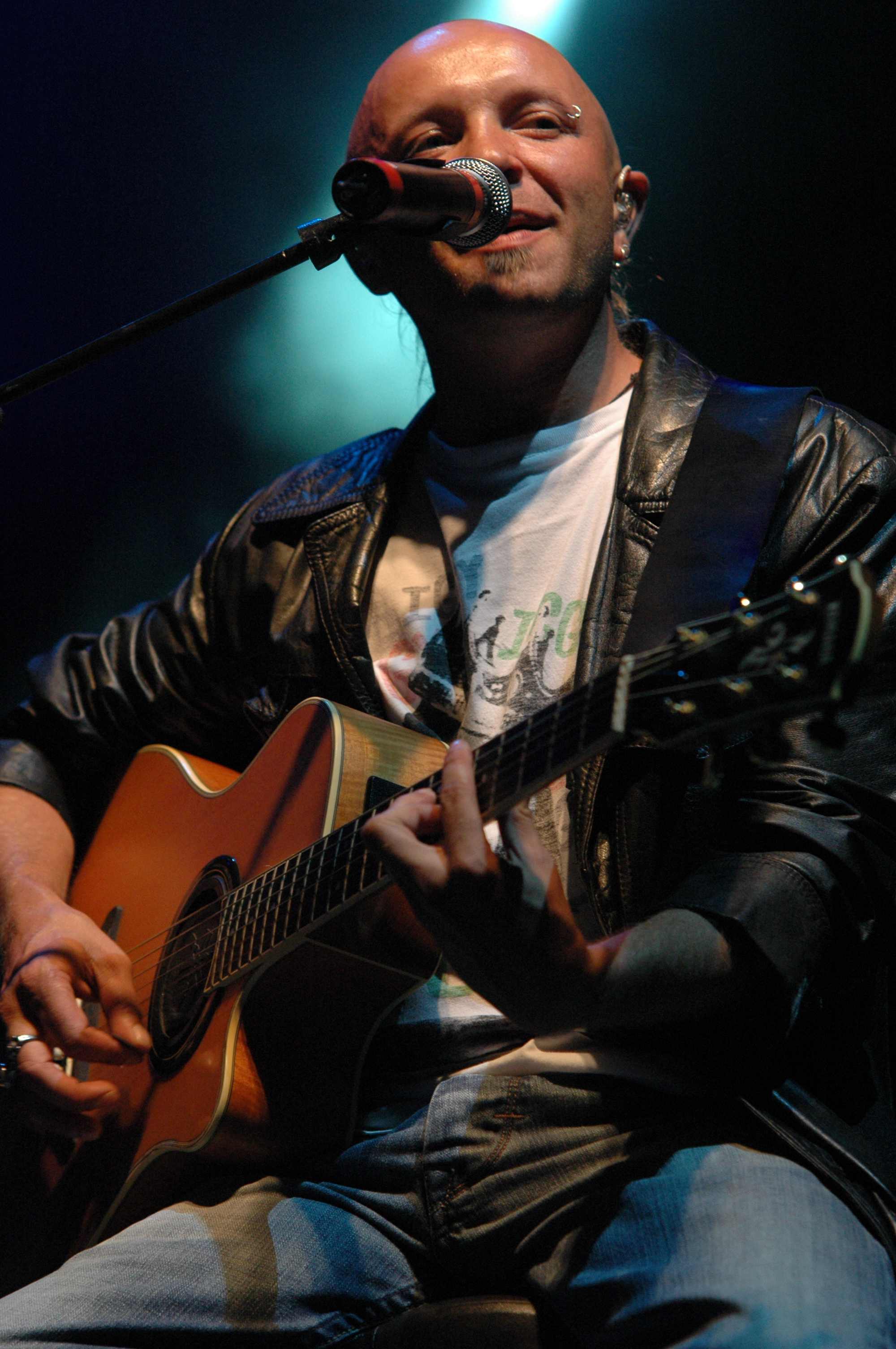 Guizmo au festival Pinède Gould (26/07/07) avec le groupe Tryo